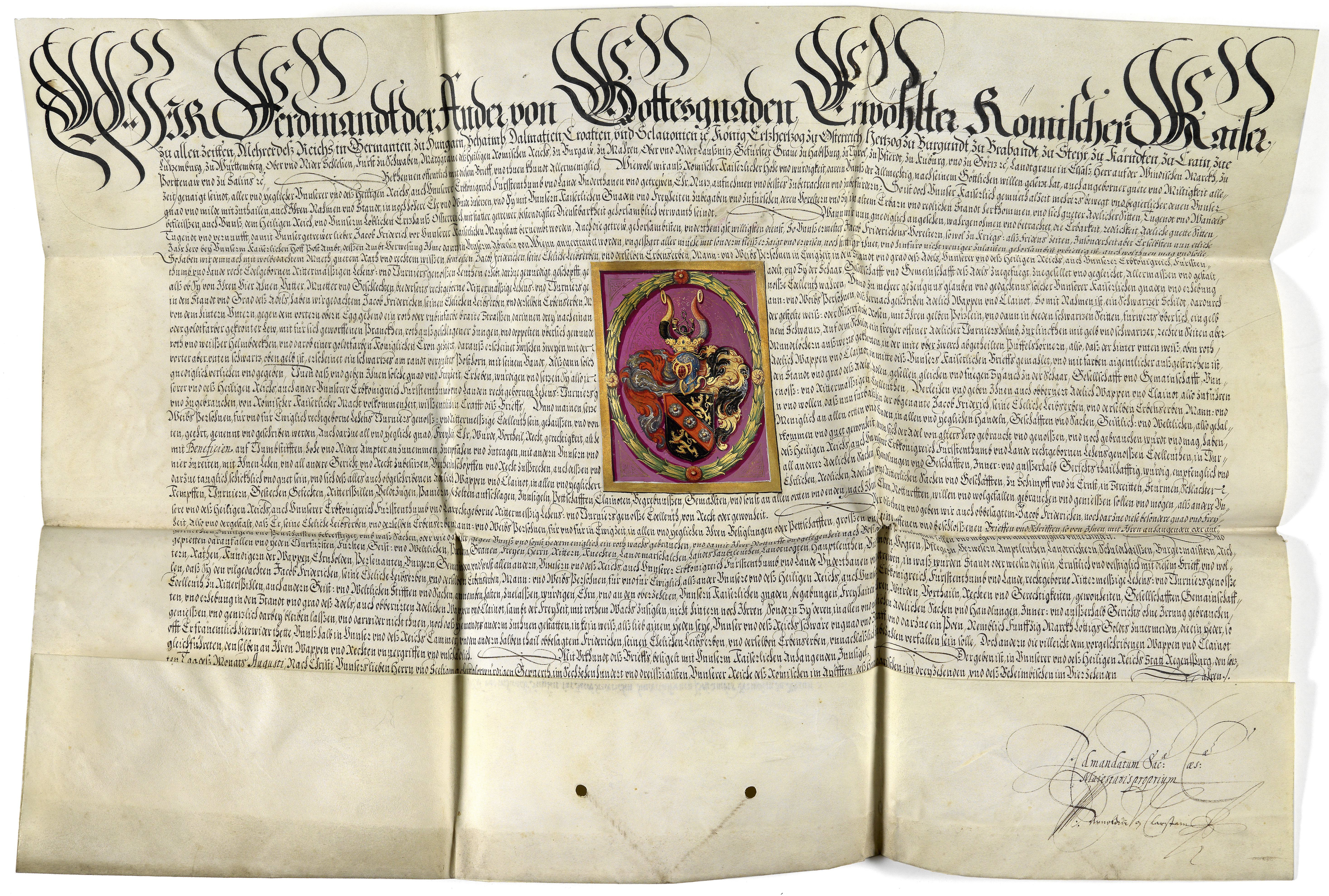 Adelsdiplom, Wappenbesserung und Rotwachsfreiheit für Jacob von Fridrich, Hofpostamts-Verweser in Wien; ausgestellt Regensburg, 31. 8. 1630, mit eigenhändiger Unterschrift Kaiser Ferdinand II., Gegenzeichnung von Reichsvizekanzler Peter Heinrich v. Stralendorf und Matthias Arnoldin v. Clarstein, Refendar der deutschen Expedition der Reichshofkanzlei. Pergamenturkunde 55 x 80 cm, guter Erhaltungszustand, Siegel fehlt.